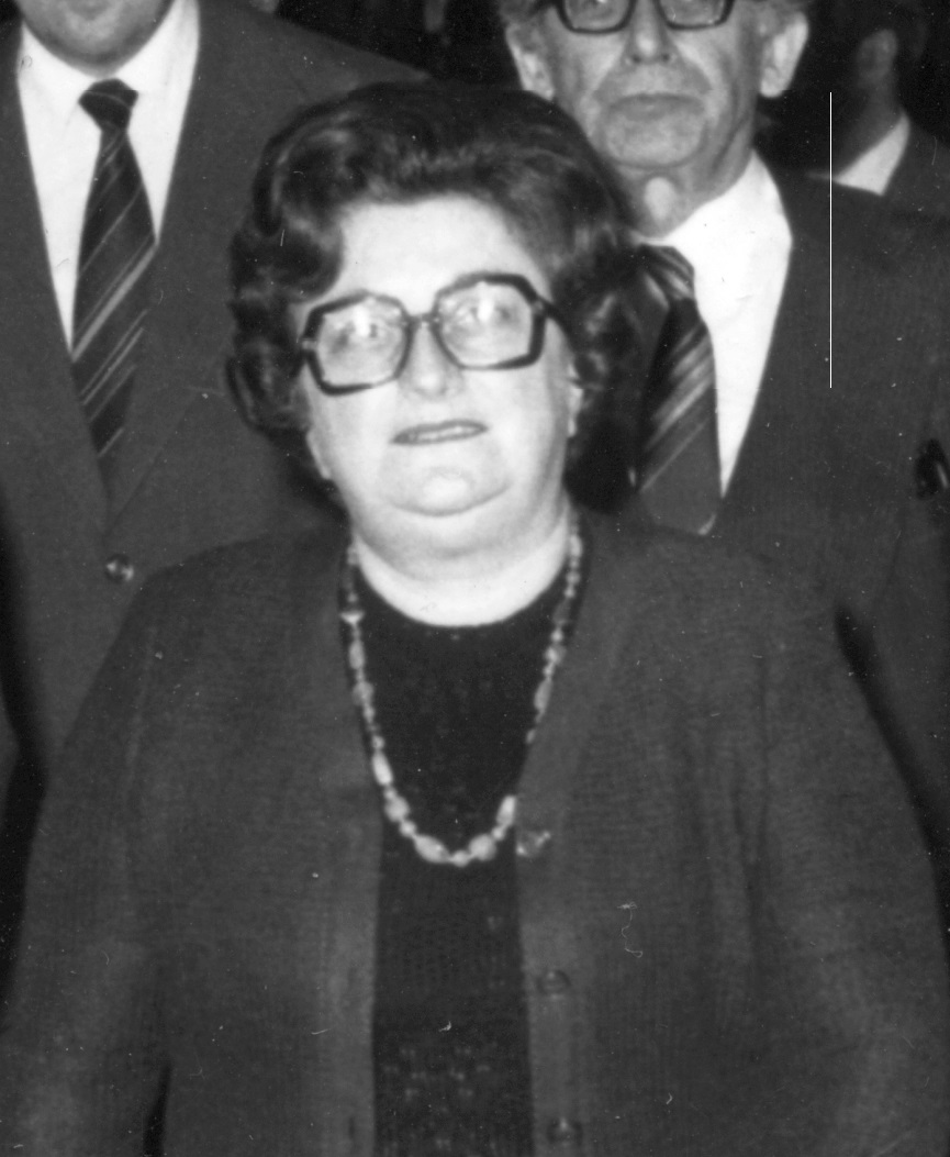 Szikra Nyomda "B" üzemegység az Árpád híd lábánál. Elől Kádár János MSZMP első titkár, mellette Keserű Jánosné könnyűipari miniszter, kettejük között Maróthy László PB tag. Location: Hungary, Budapest XIII. Tags: celebrity, factory, Budapest Title: Szikra Nyomda \